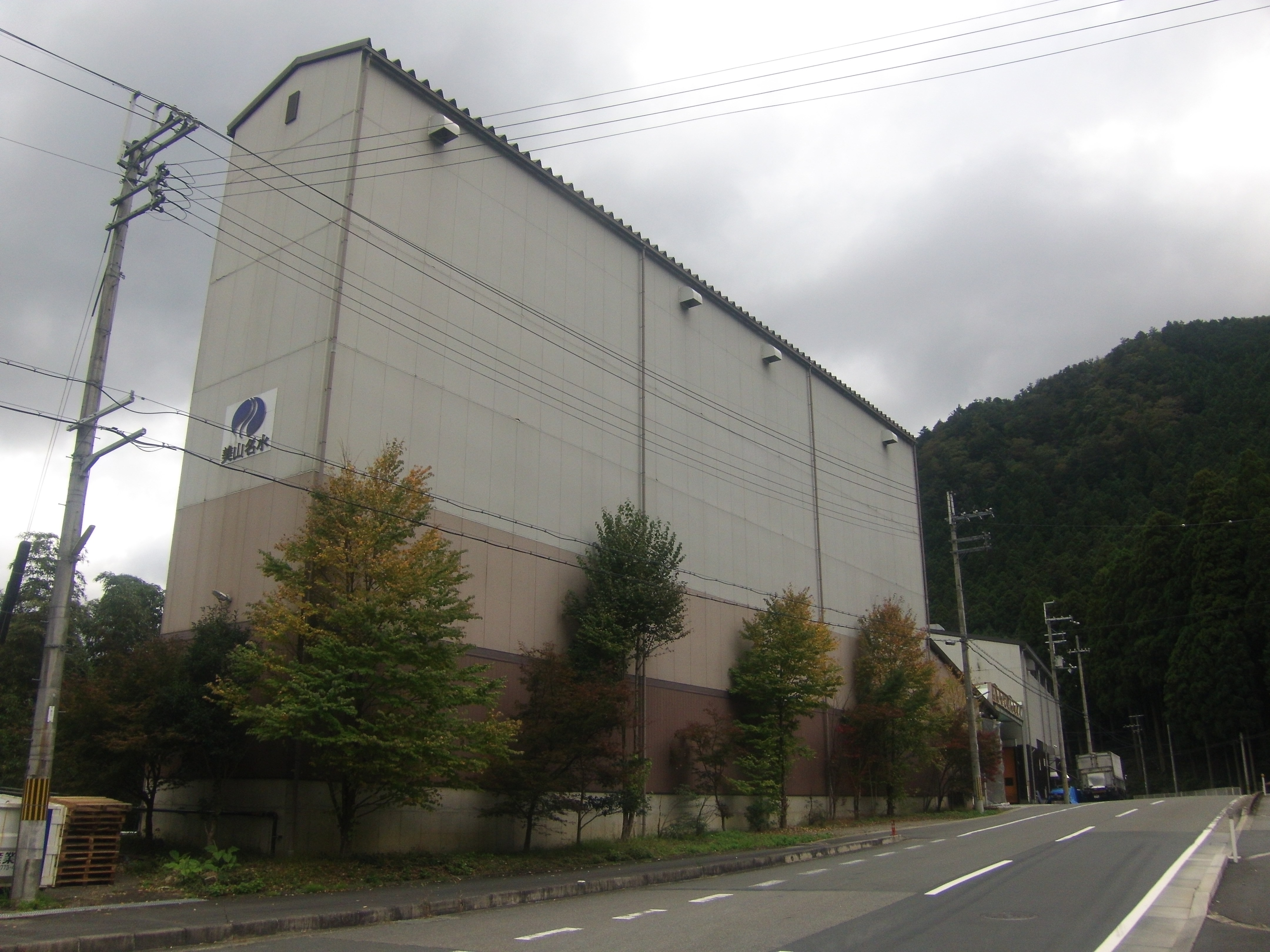 丹波高原の名水が湧く「神田(じんでん)の水」の向かいにあり、同じ水源を汲み上げ加工している南丹市の美山名水㈱の社屋・工場